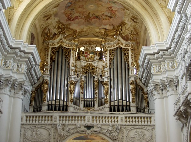 Stift Sankt Florian bei Linz, Brucknerorgel